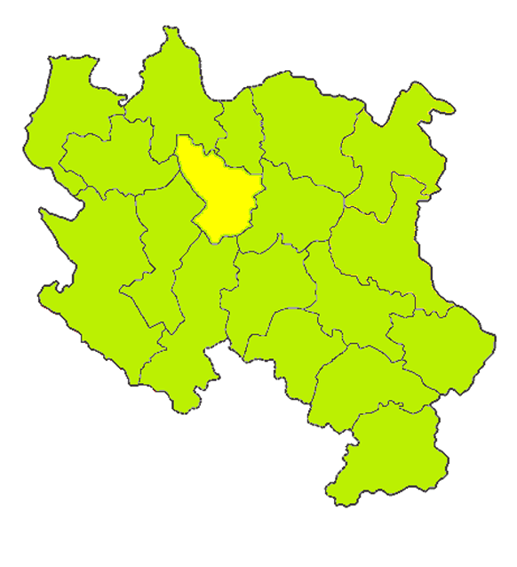 Map of Šumadija